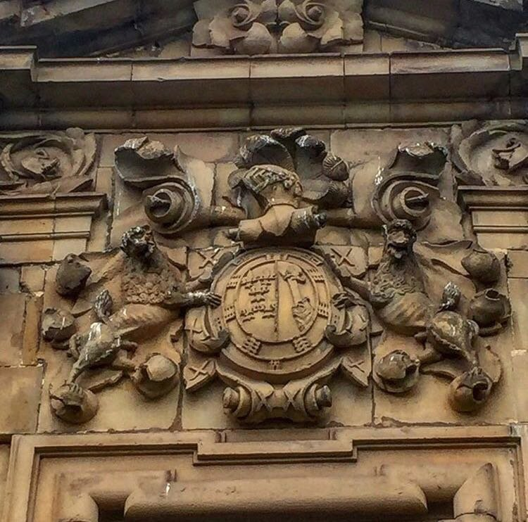 Escudu d'armes de los Argüelles-Ceis y Navia con lleones rampantes sofitándoles.